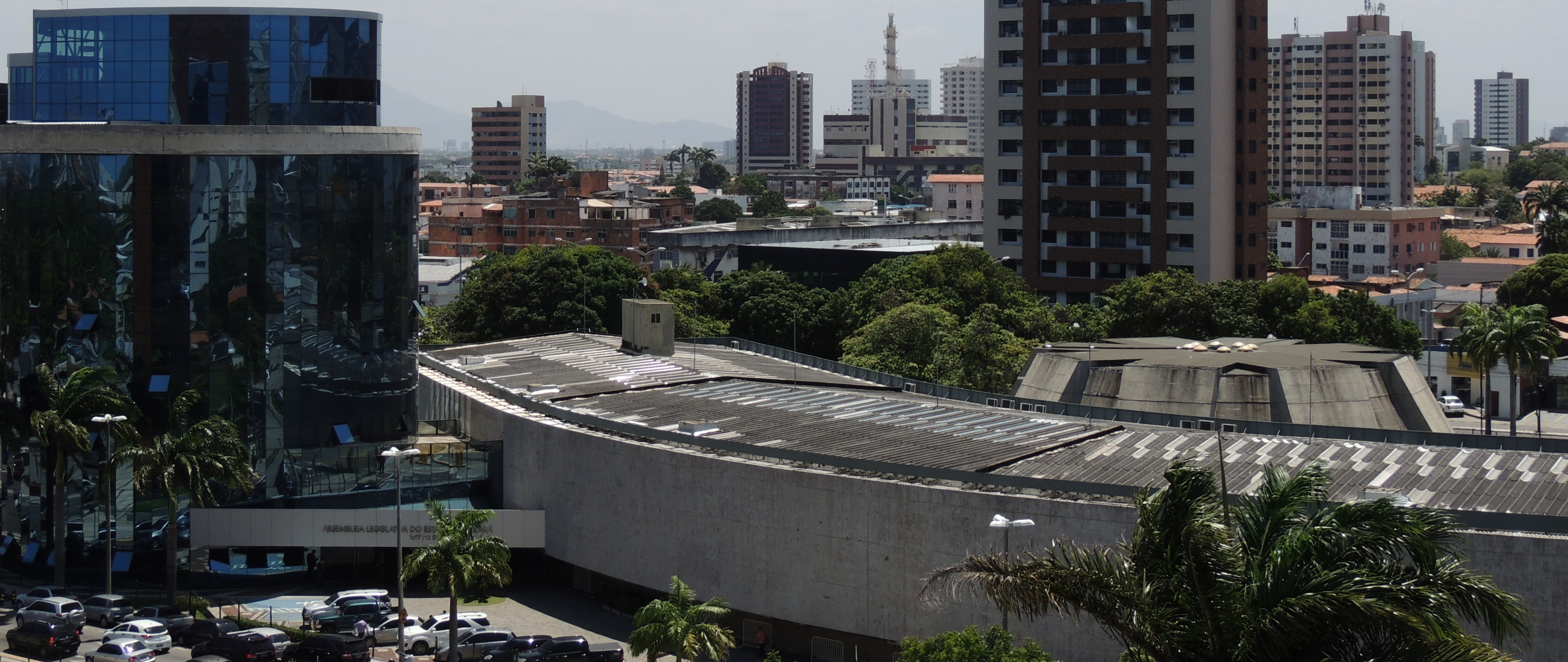 Antigo edifício da Assembléia Provincial, atual sede da Assembléia Legislativa Estadual, Palácio Deputado Adauto Bezerra e o Edifício Senador César Cals.